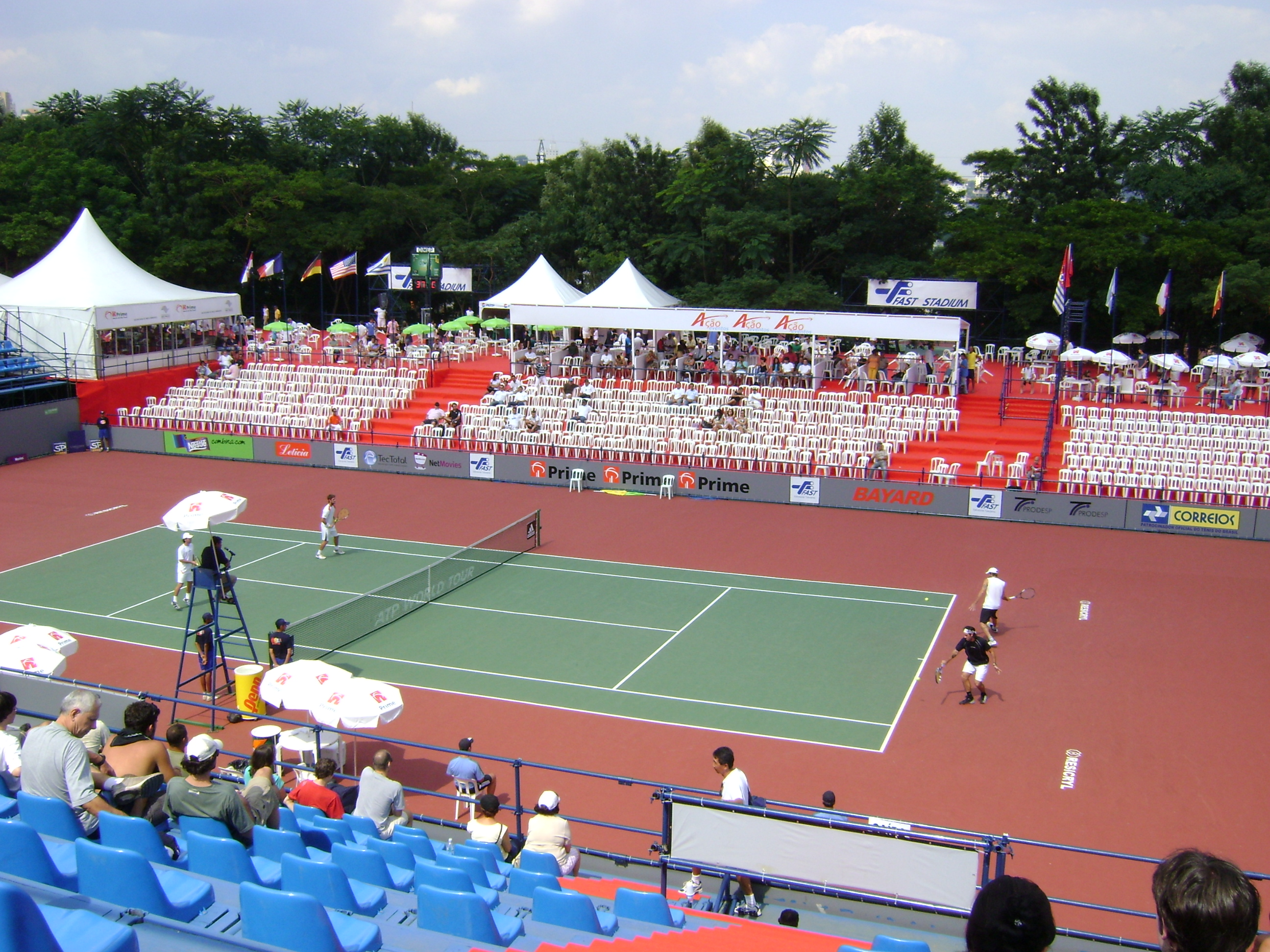 Aberto de São Paulo de Tênis de 2009 (aquecimento da partida de duplas entre Ricardo Mello e Caio Zampieri contra Franco Ferreiro e Flavio Saretta.